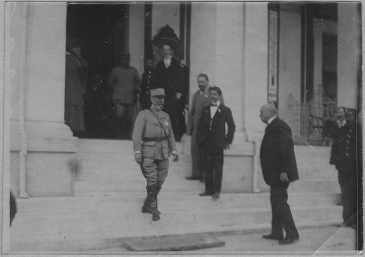 Rocques à Athènes (13 novembre 1916). Hôtel de la Grande-Bretagne. Service photographieque de l'armée.